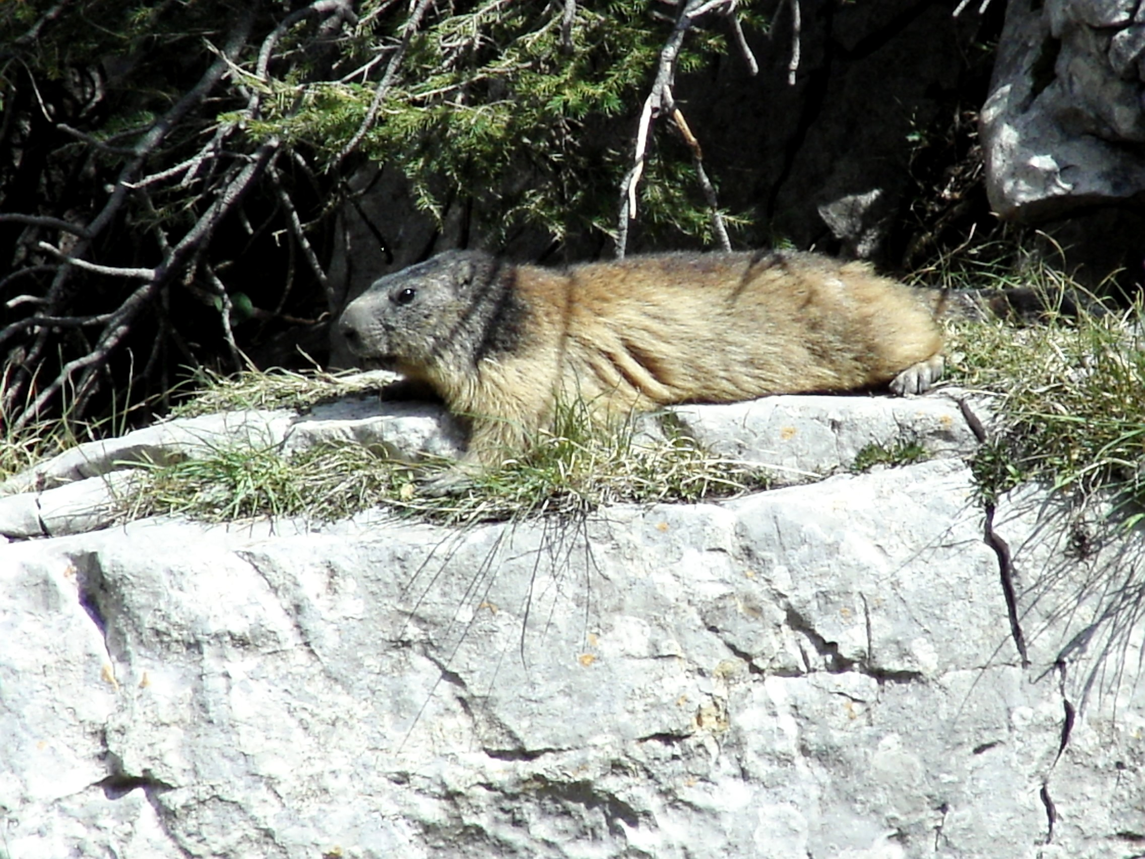 Marmota marmota (alpine marmot), Vercors (France)